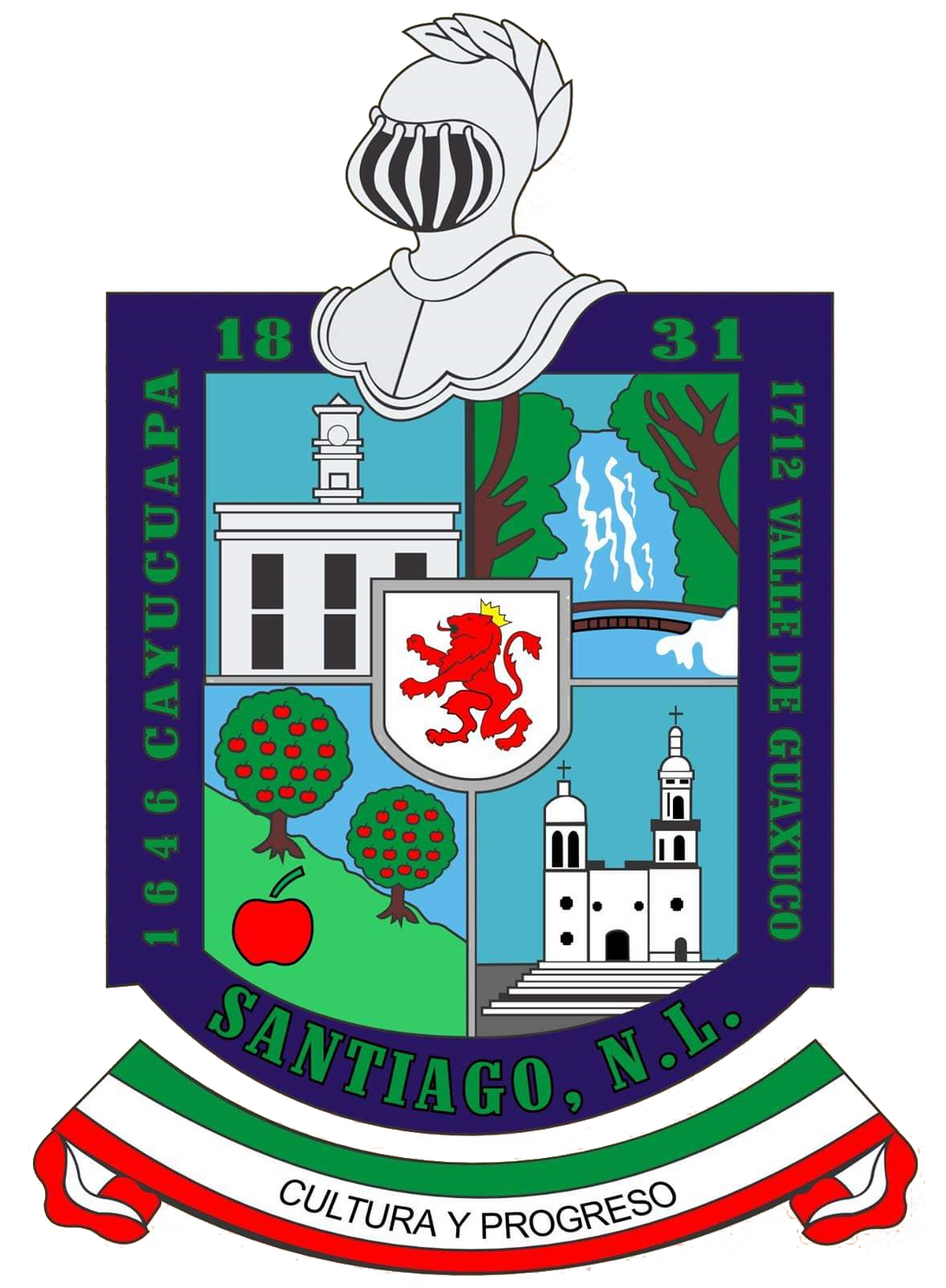 Escudo de Santiago